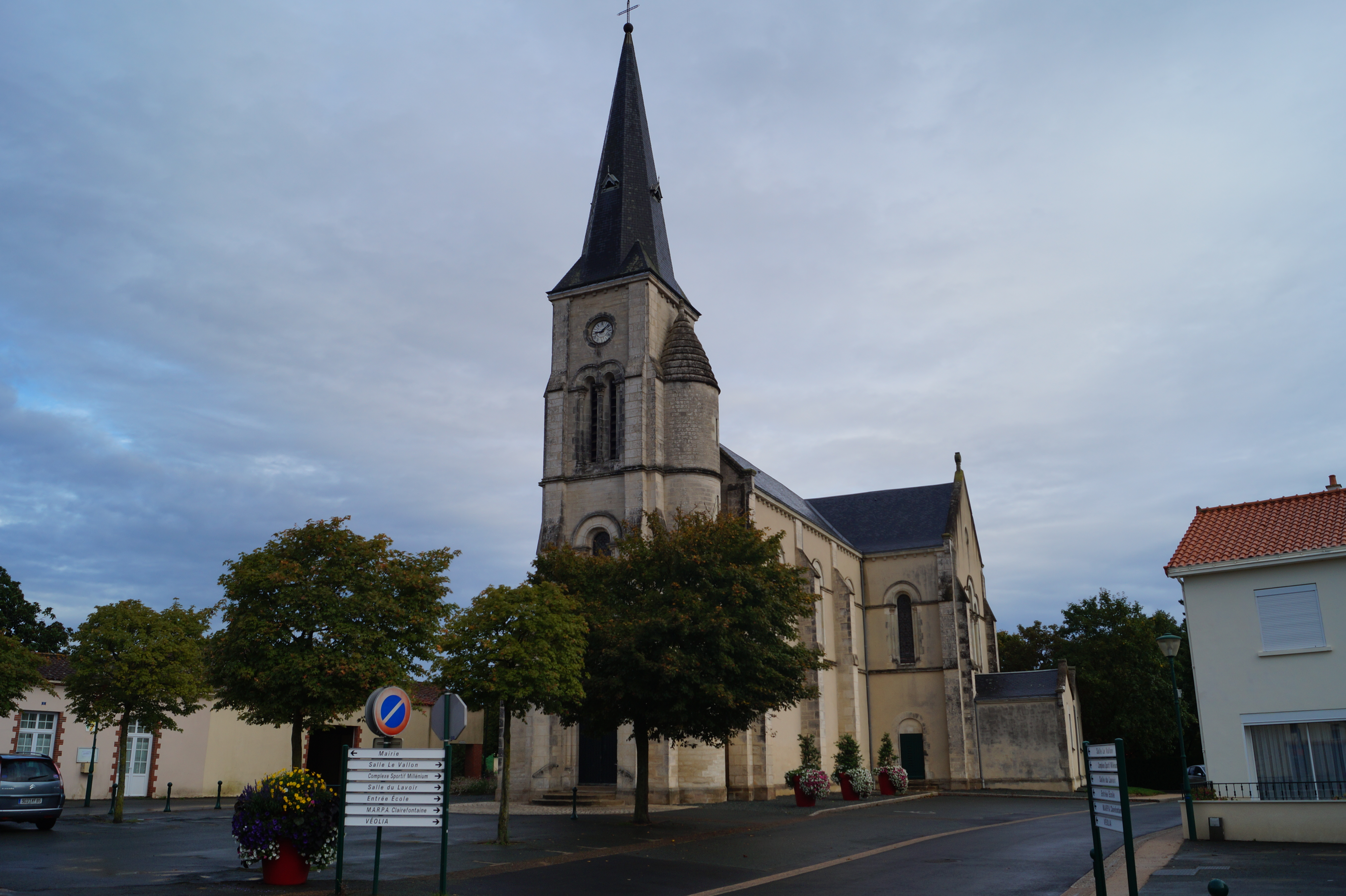 L’église de Sainte-Florence.